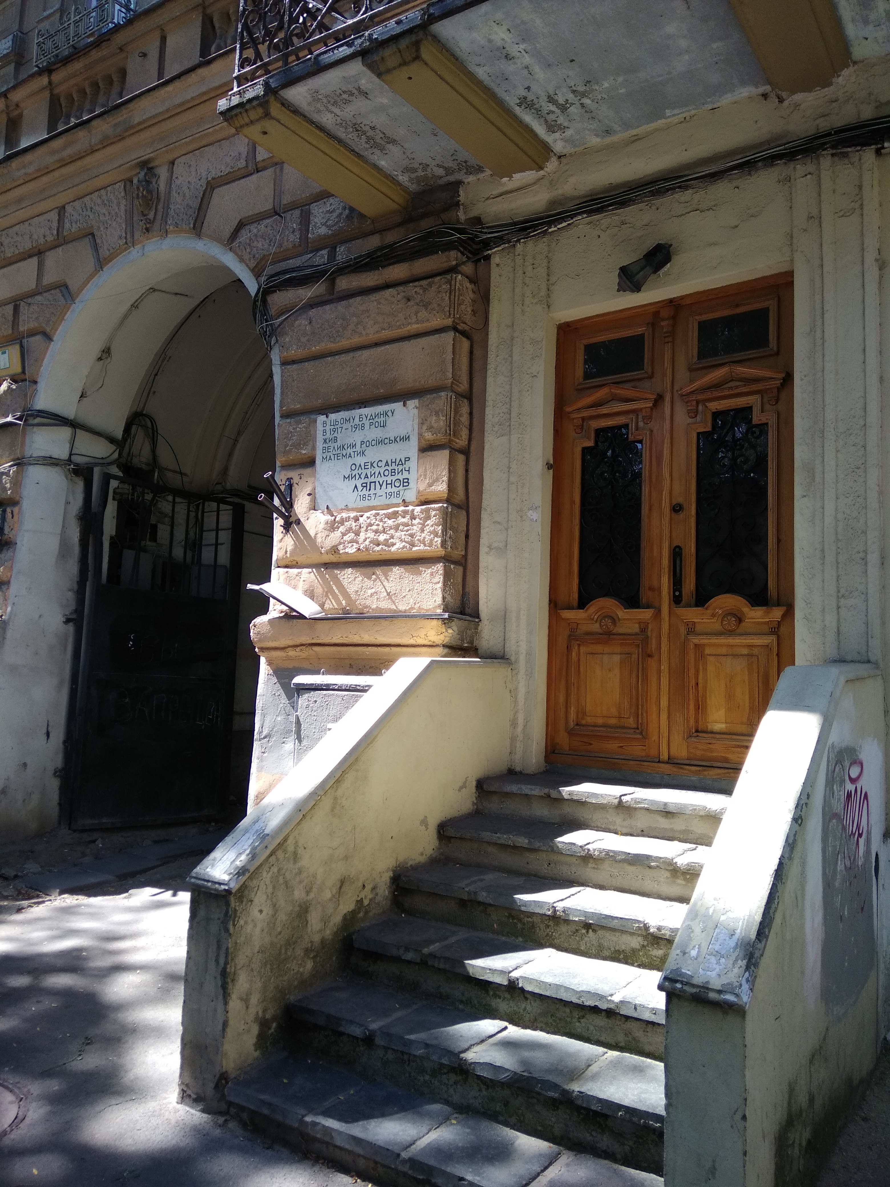 Будинок, в якому жили і працювали:- О..М. Ляпунов - вчений-математик, академік;- Б.М. Ляпунов - мовознавець, академік;- О.І. Том сон - мовознавець, професор;- В. Василько - український режисер, Одеса, вул. Софіївська, 10